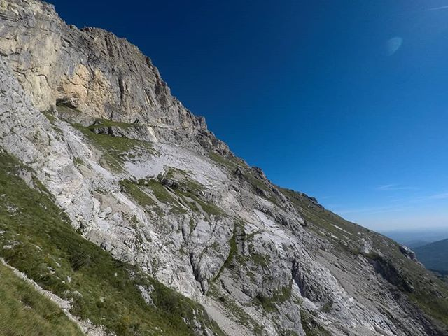 Grotta delle Fate di Pretare, sul versante sud-orientale del Monte Vettore (Piramide, costa la Monna)